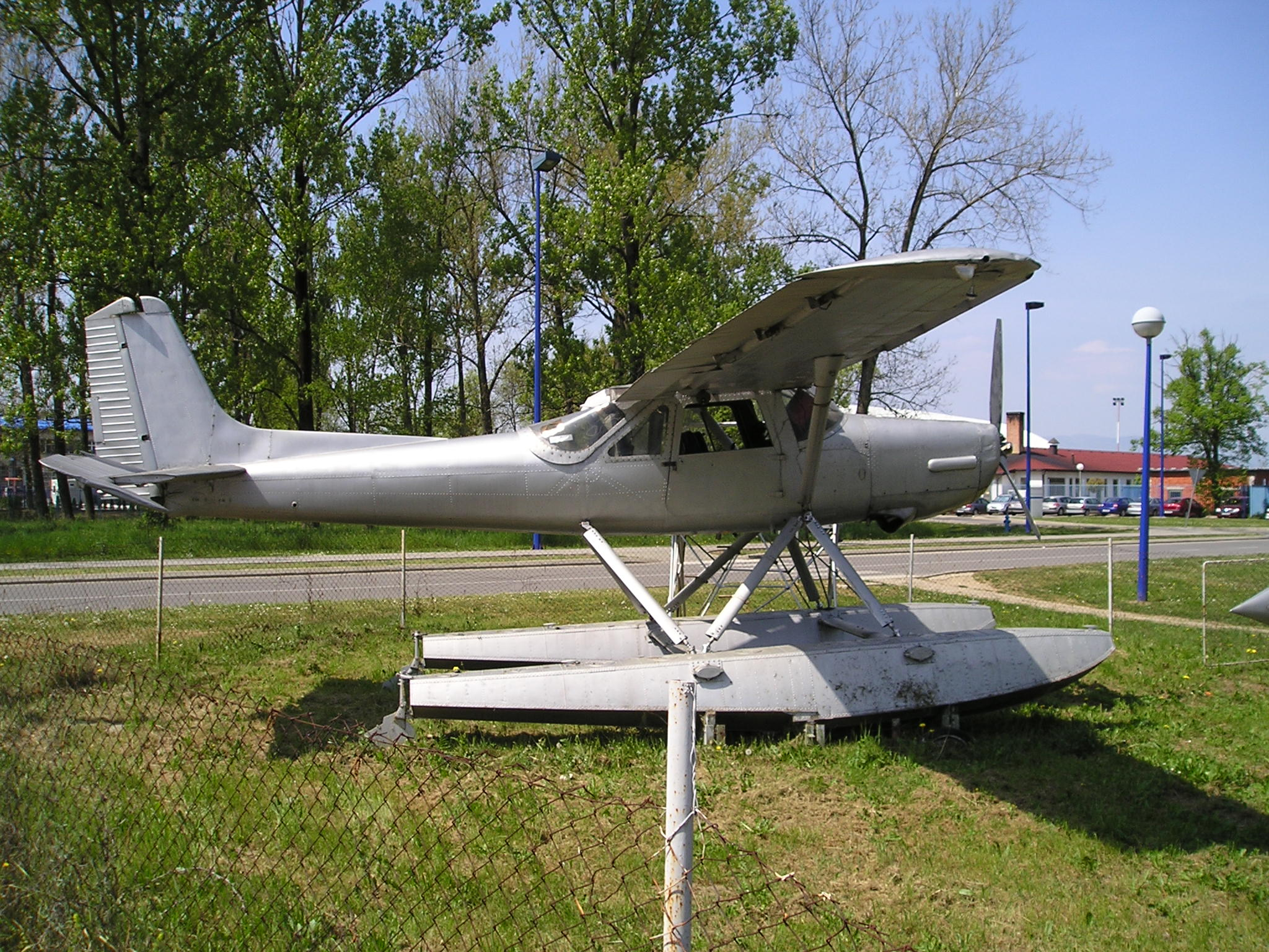 Utva 66H (Zrakoplovno tehnička škola Rudolf Perešin)